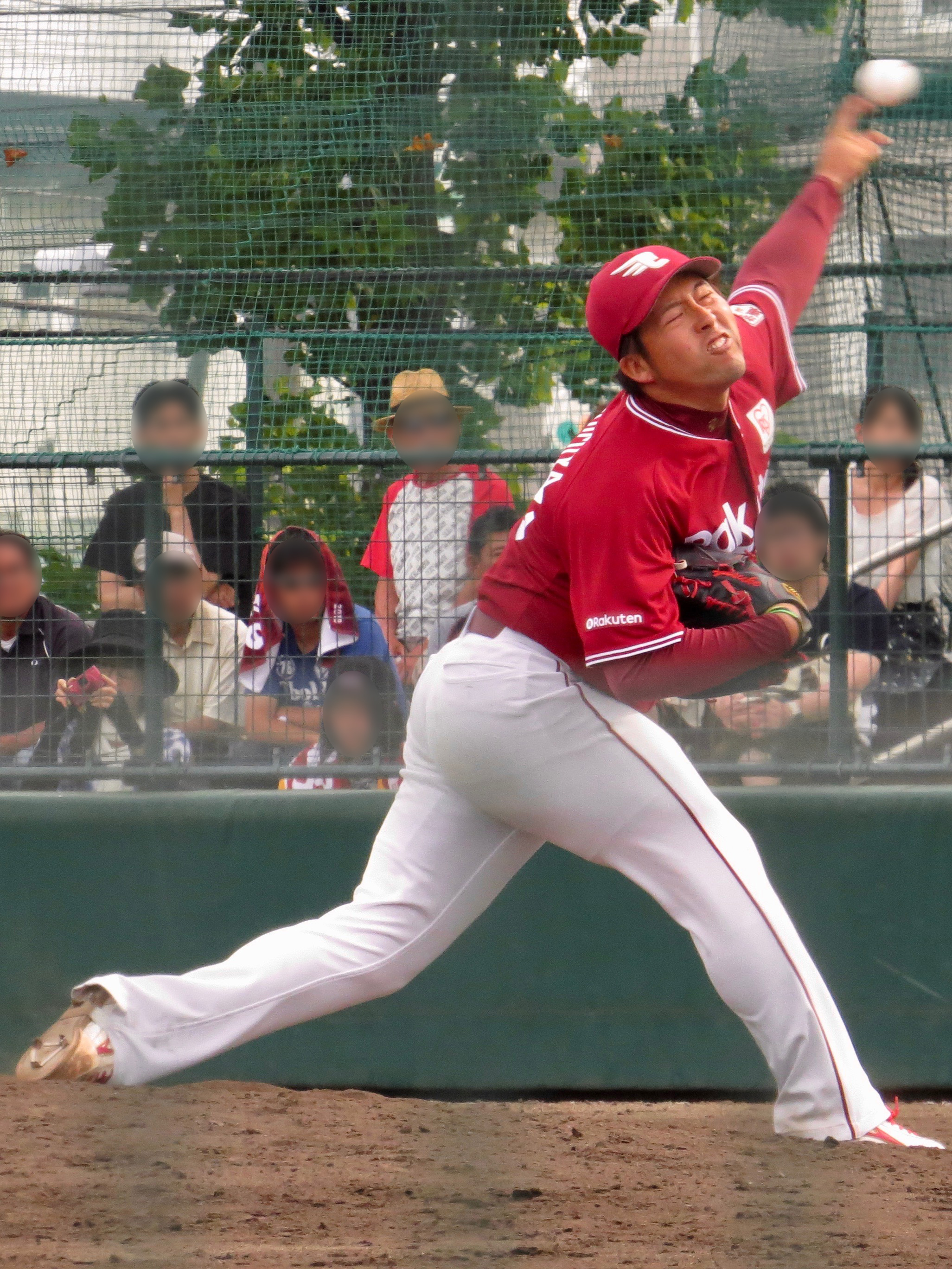 東北楽天ゴールデンイーグルスの選手。ロッテ浦和球場にて。